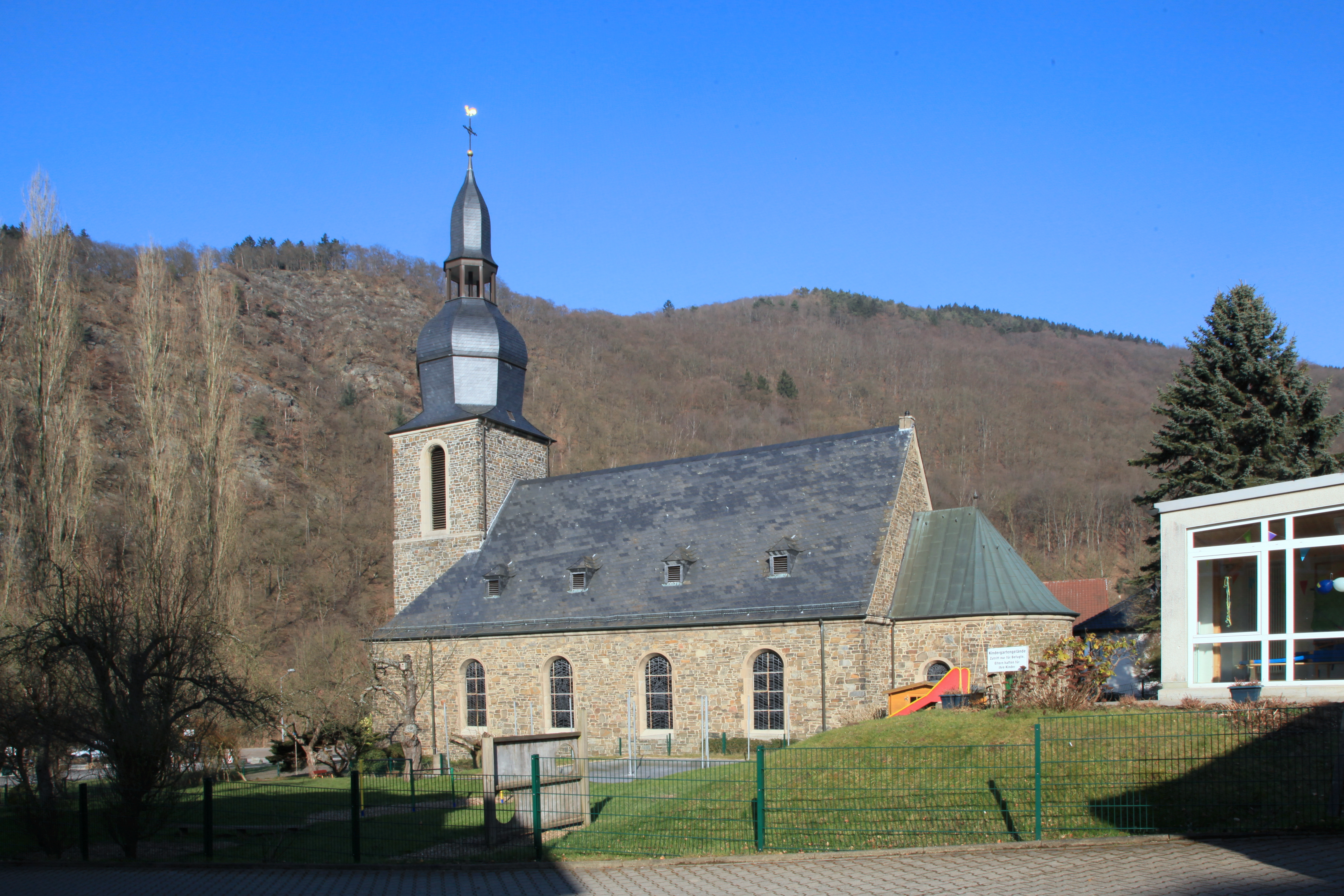 St. Josef, Hagener Straße in Nachrodt-Wiblingwerde